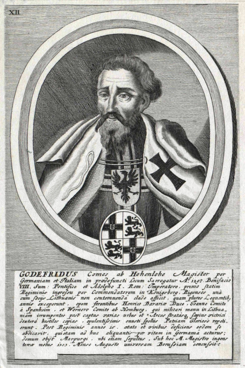 Gottfried von Hohenlohe (1270–1310)